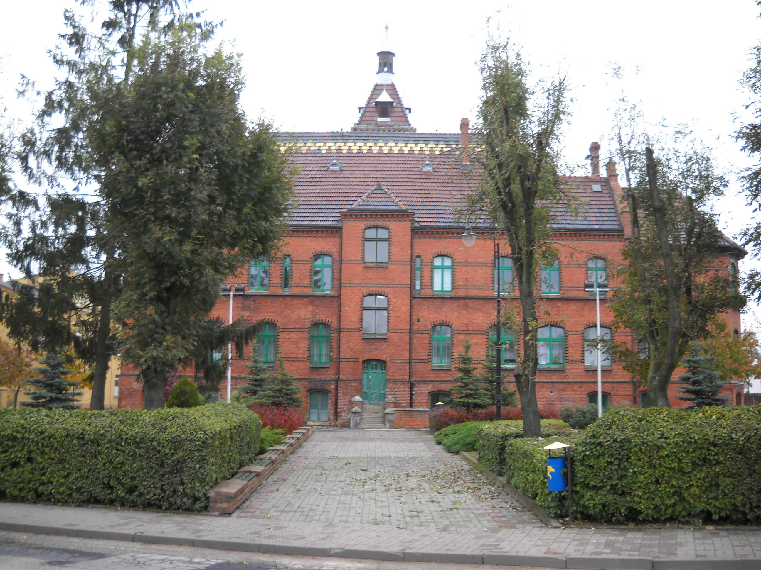 Urząd Miasta i Gminy Łasin